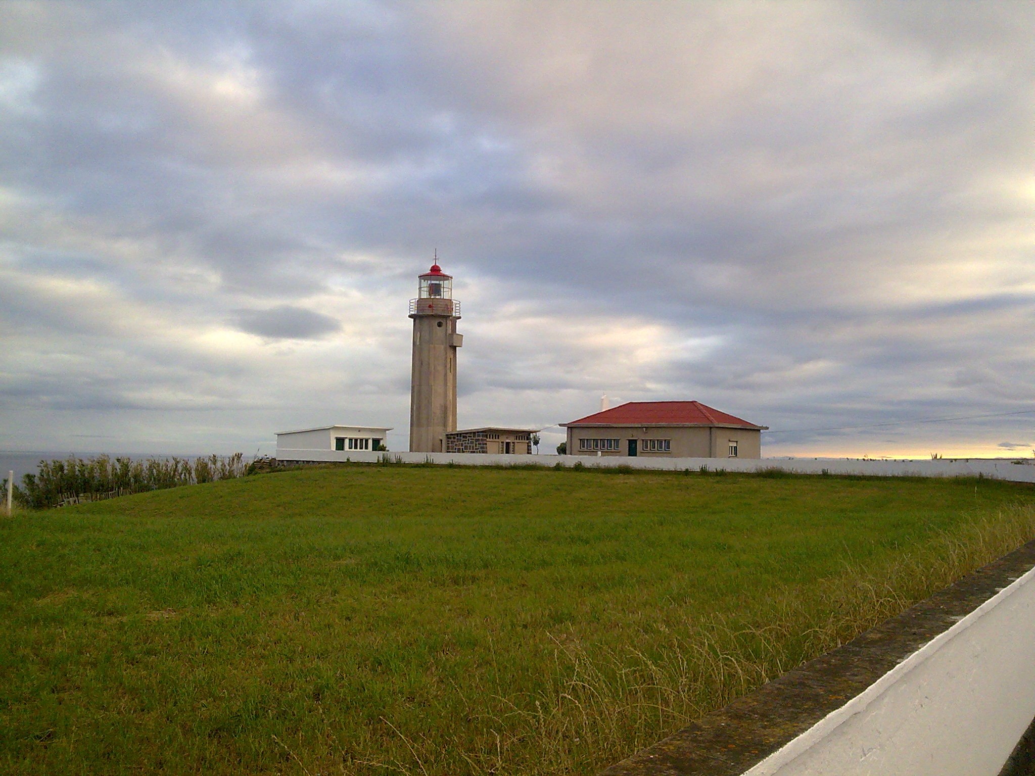 Farol de Ponta Garça, ilha de São iguel, Açores, Portugal